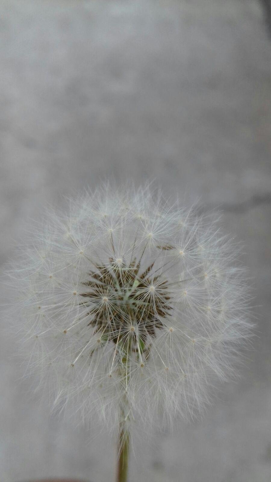 Diente de león joven